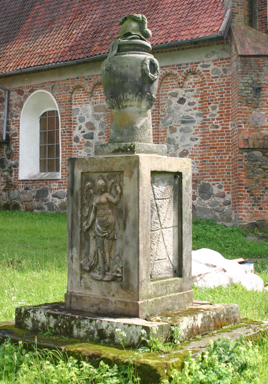 Mołtajny, Polska, powiat kętrzyński.